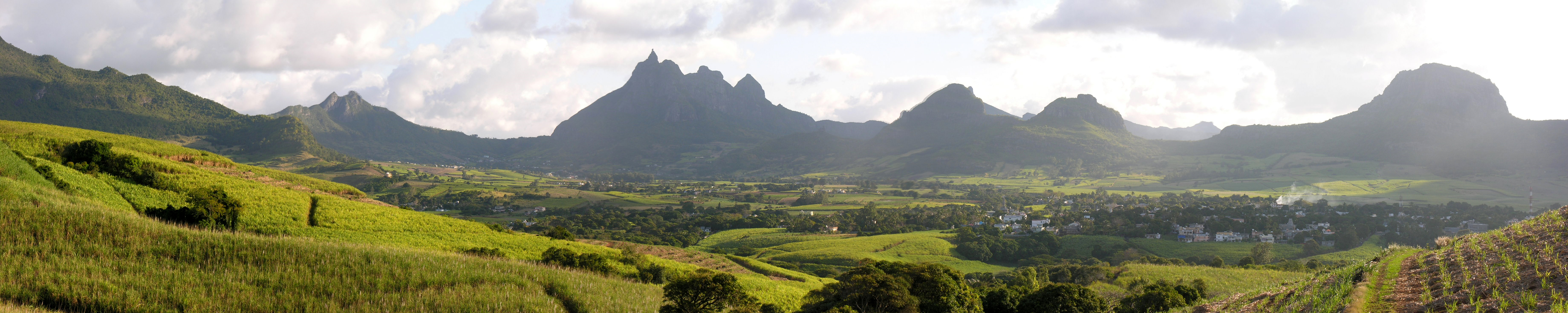 Mauritius, Landscape near Les Mariannes